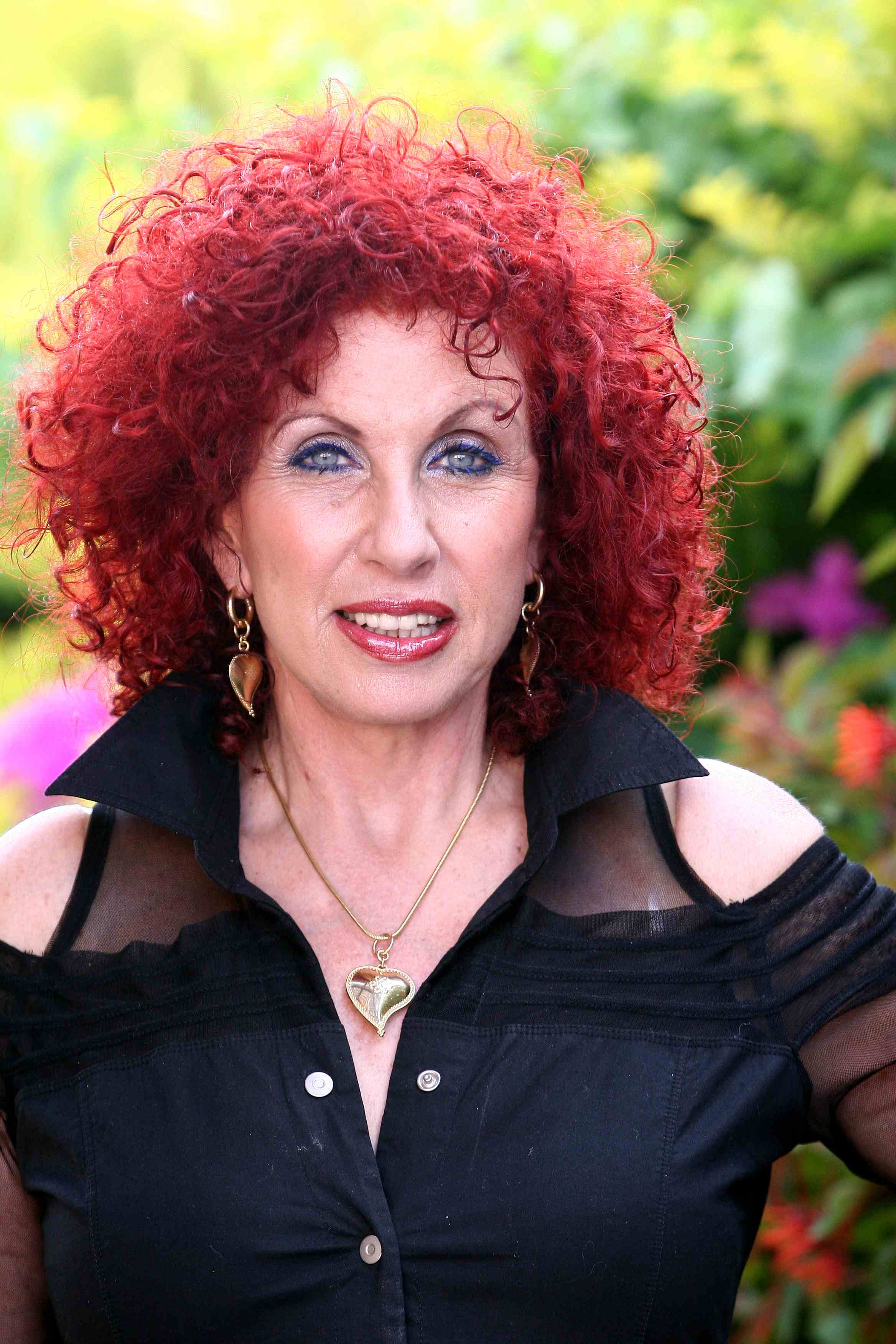 תמי רווה